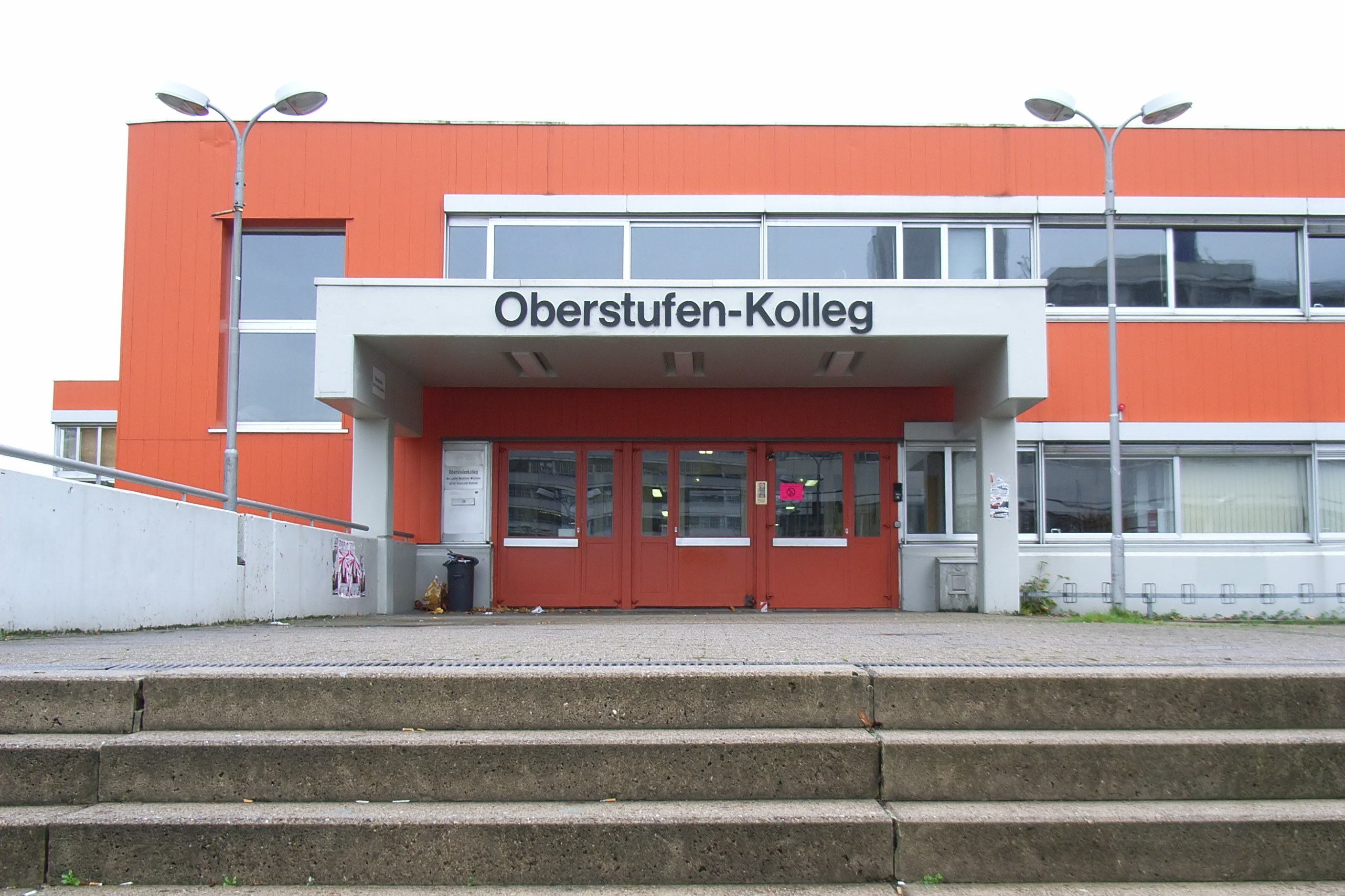 Bielefeld, Deutschland: Oberstufen-Kolleg